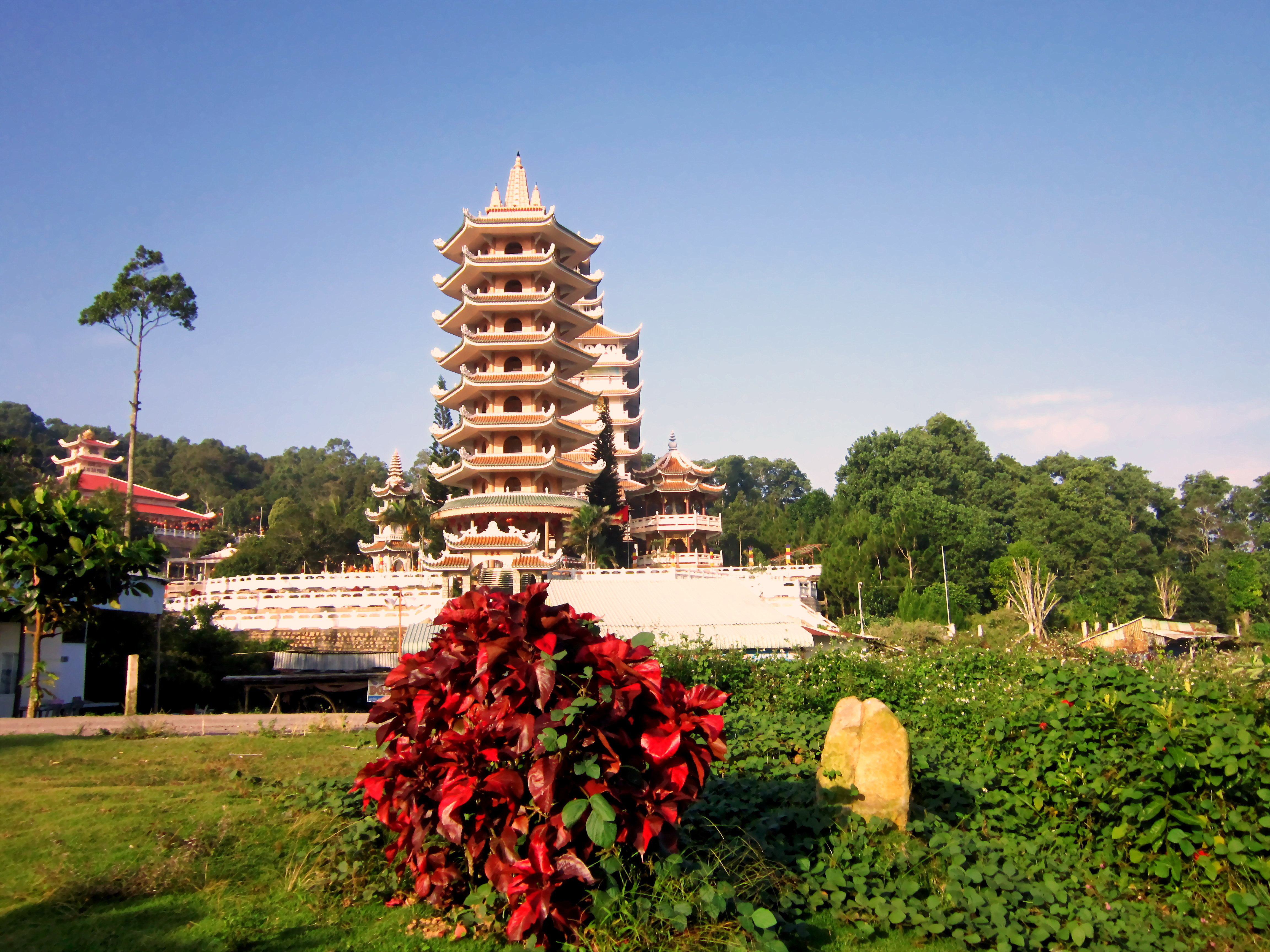 Chùa Vạn Linh trên núi Cấm (An Giang, Việt Nam).